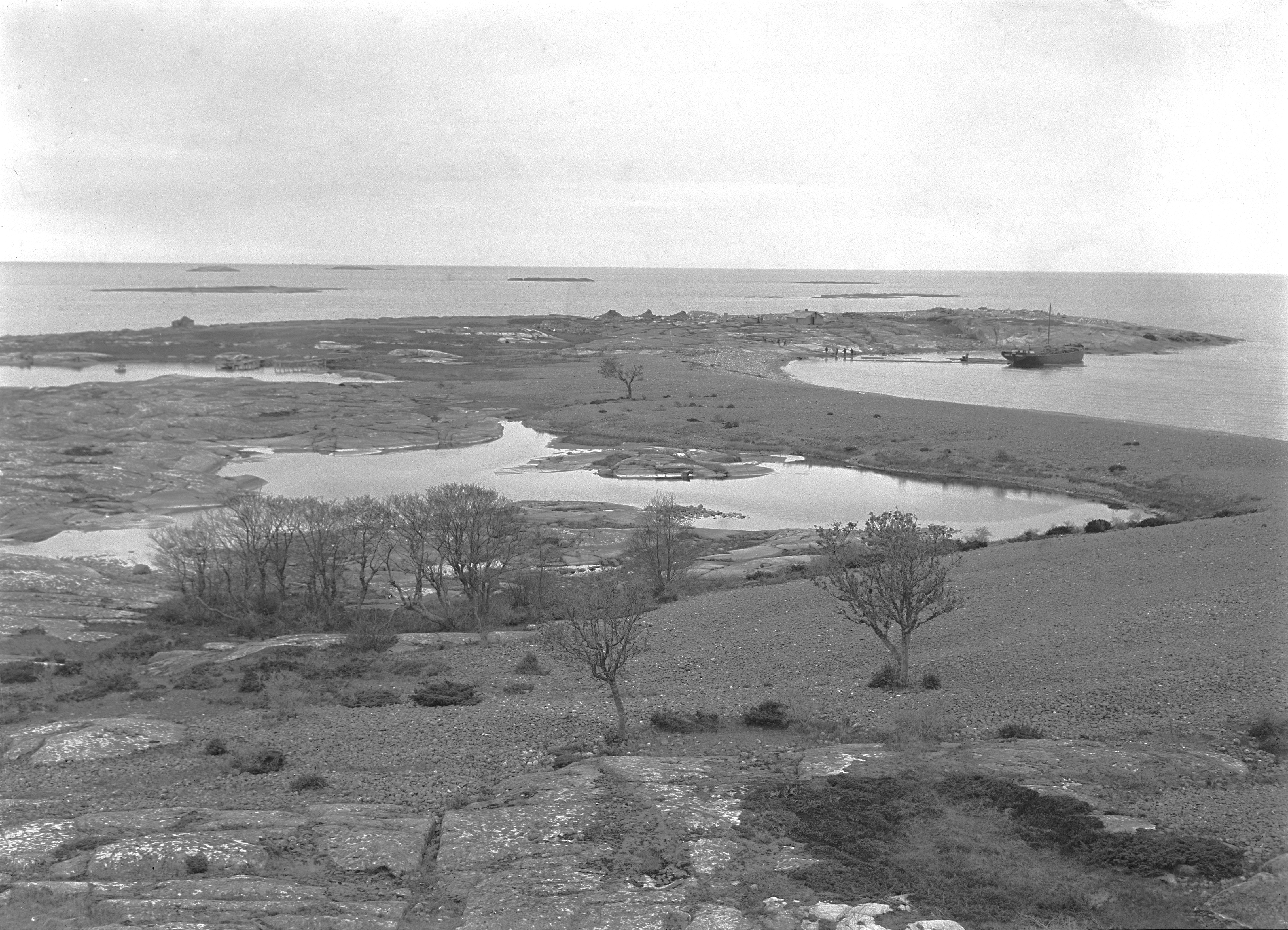 Records creator: Luotsi- ja majakkalaitos, \nArchive/Fond: Luotsi- ja majakkalaitoksen arkisto, \nSeries: Majakat, \nUnit: Uaba:168 LÖ¥gskär; majakkasaari, \nInclusive dates: 1918 - 1919\n